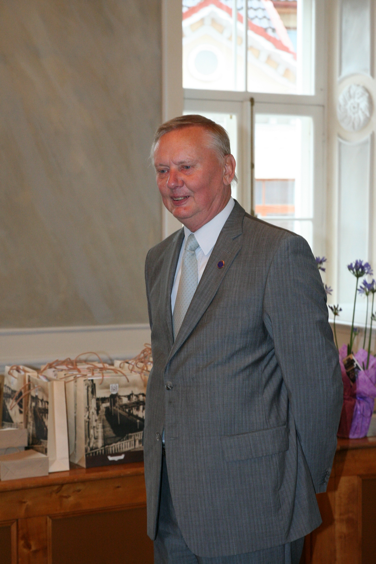 Heiki Tamm, Tartu Ülikooli botaanikaaia ja Tallinna botaanikaaia endine direktor, Tartu medalite üleandmisel 29. juunil 2014